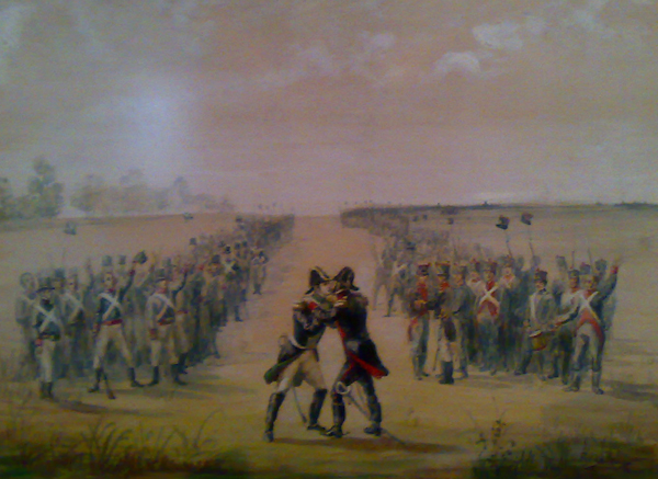 Abrazo entre Manuel Belgrano y Manuel Cabañas, tras la batalla de Tacuari